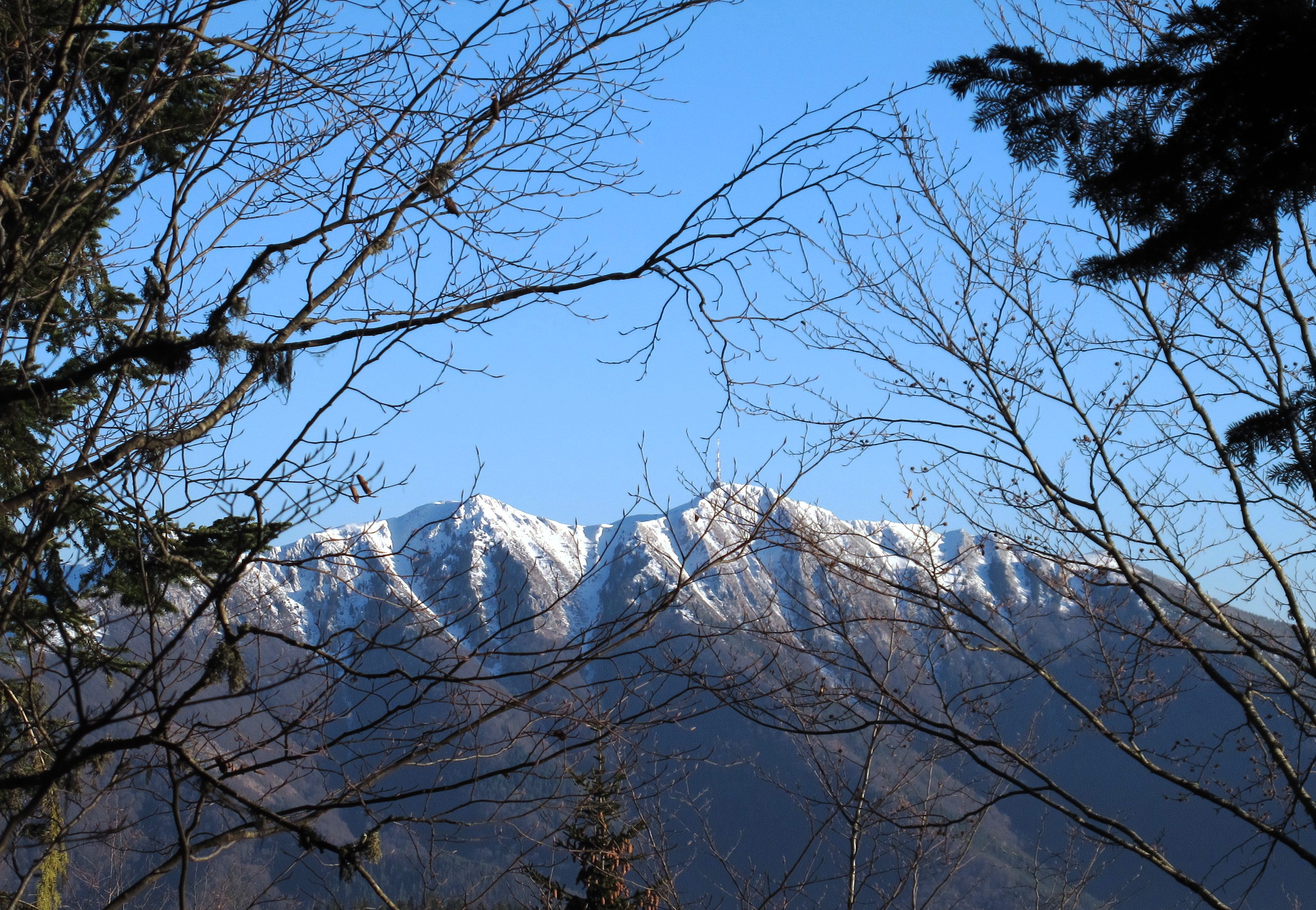 Ореляк